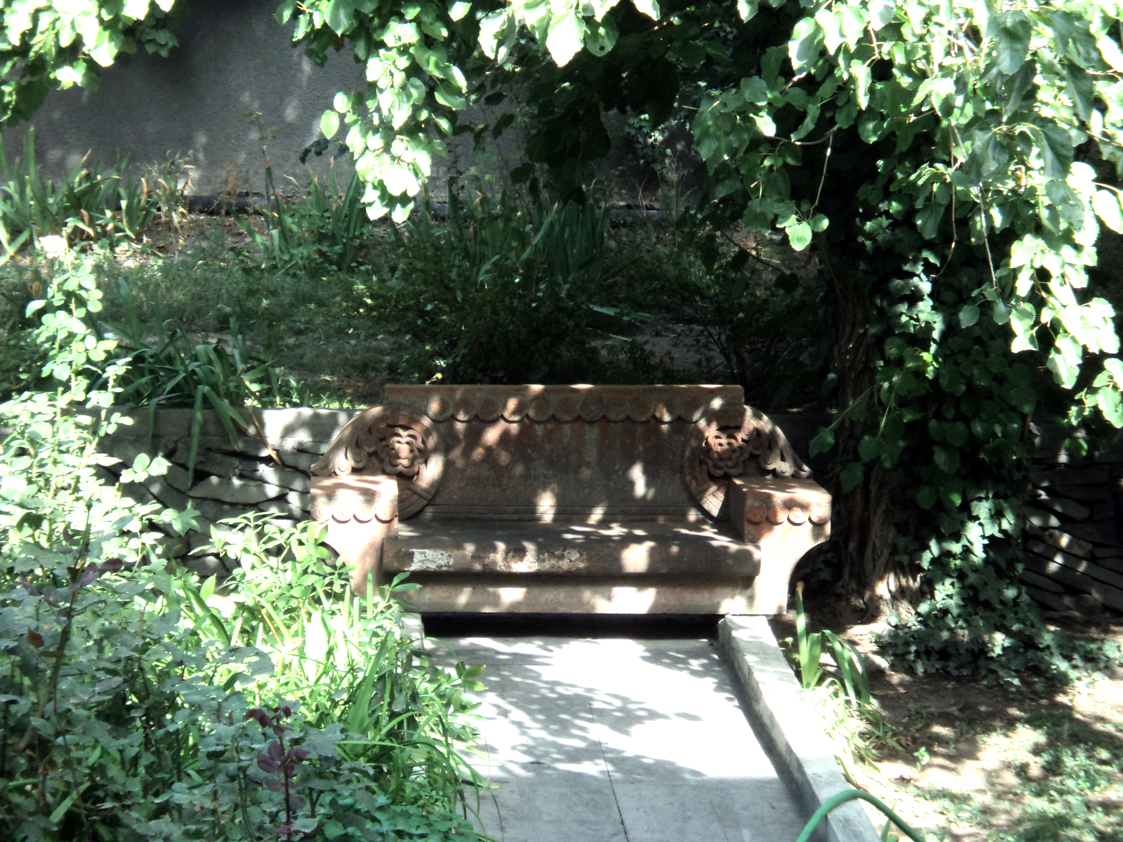 Ավետիք Իսահակյանի տուն-թանգարան